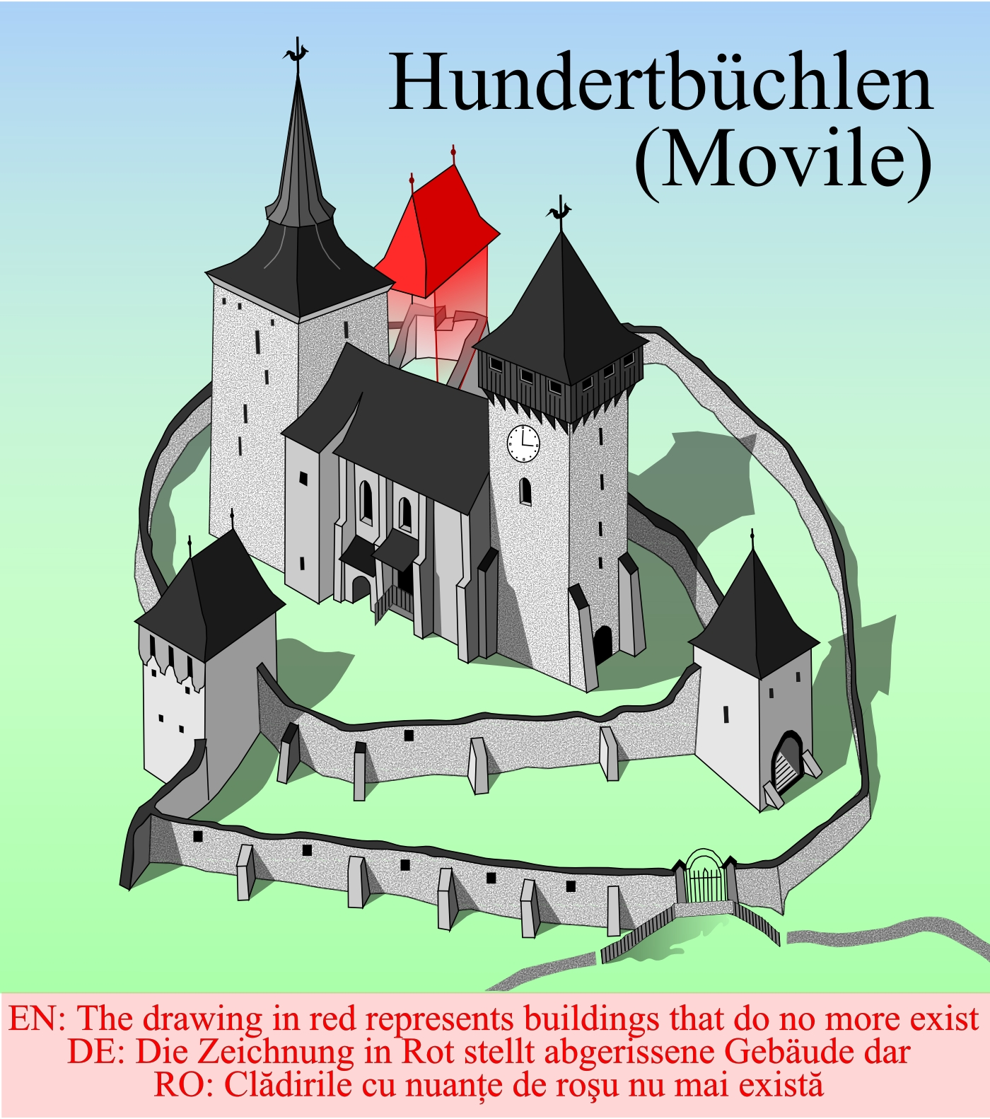 Biserica fortificata din Movile v2